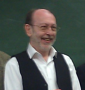 Alain de Benoist op 2 april 2012, by die Delta-Stichting in Antwerpen